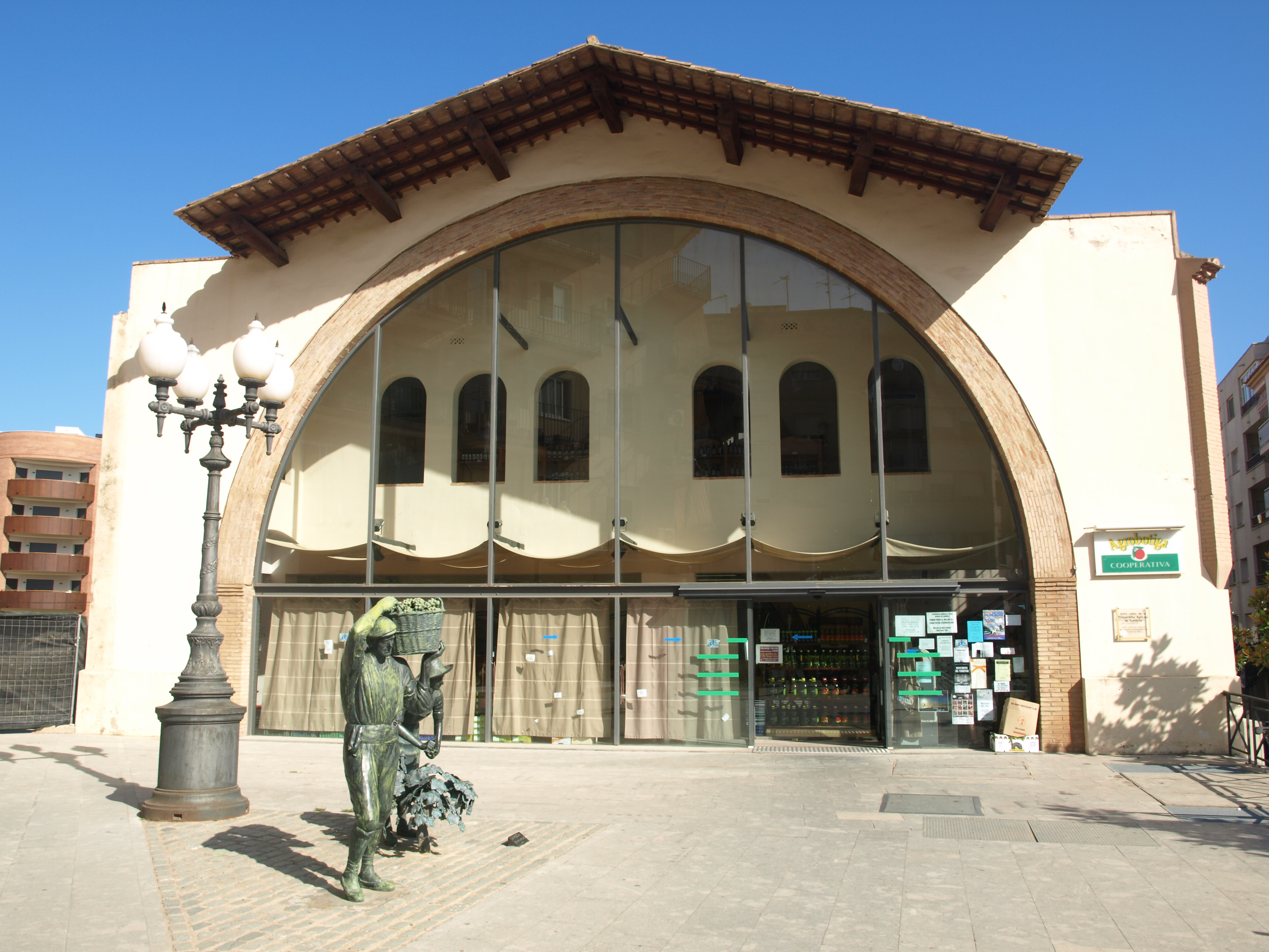 Cooperativa agrícola de Cambrils (provincia de Tarragona, España).